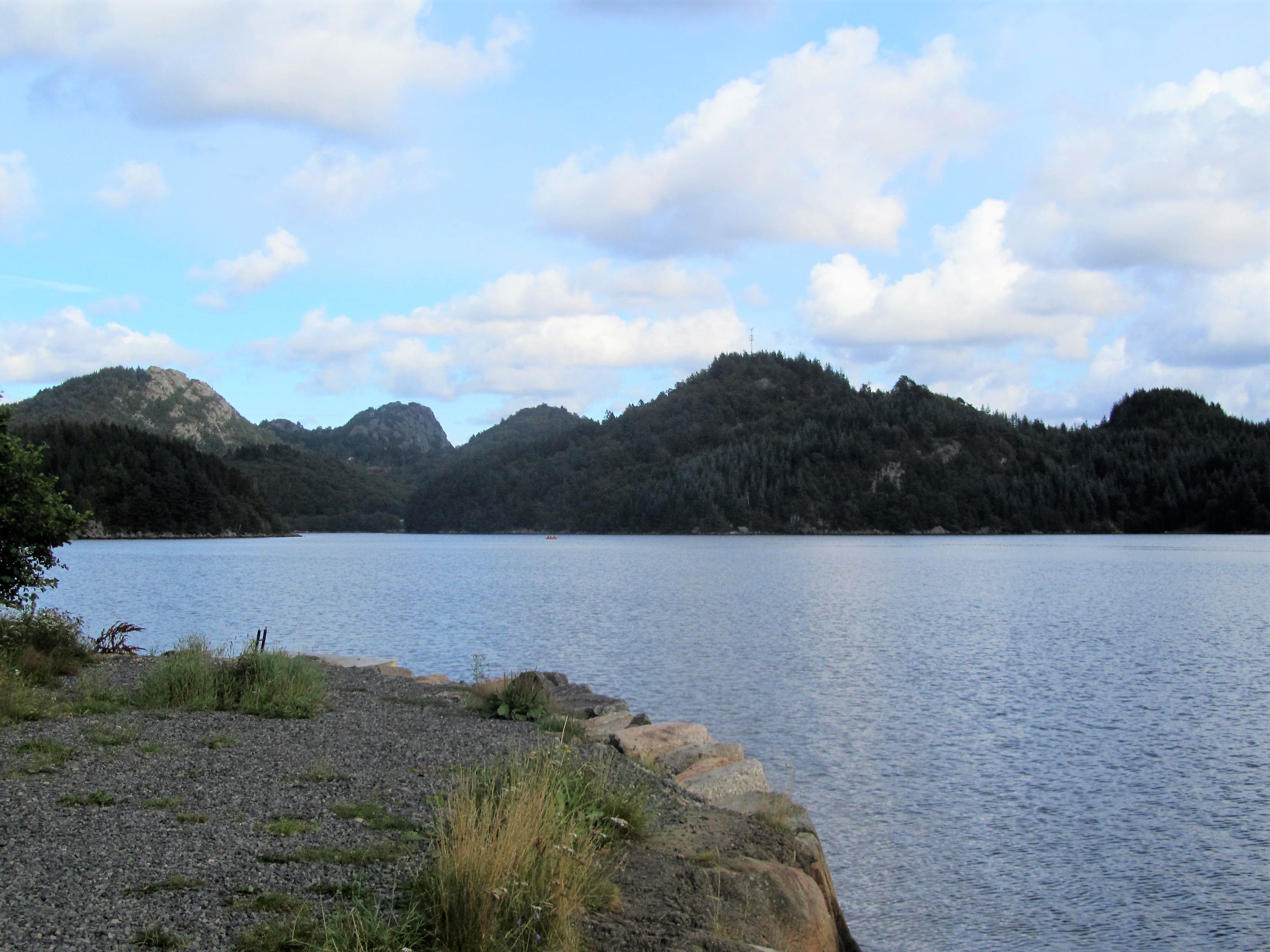 Helvikfjorden set mod NØ fra campingpladsen på vestsiden